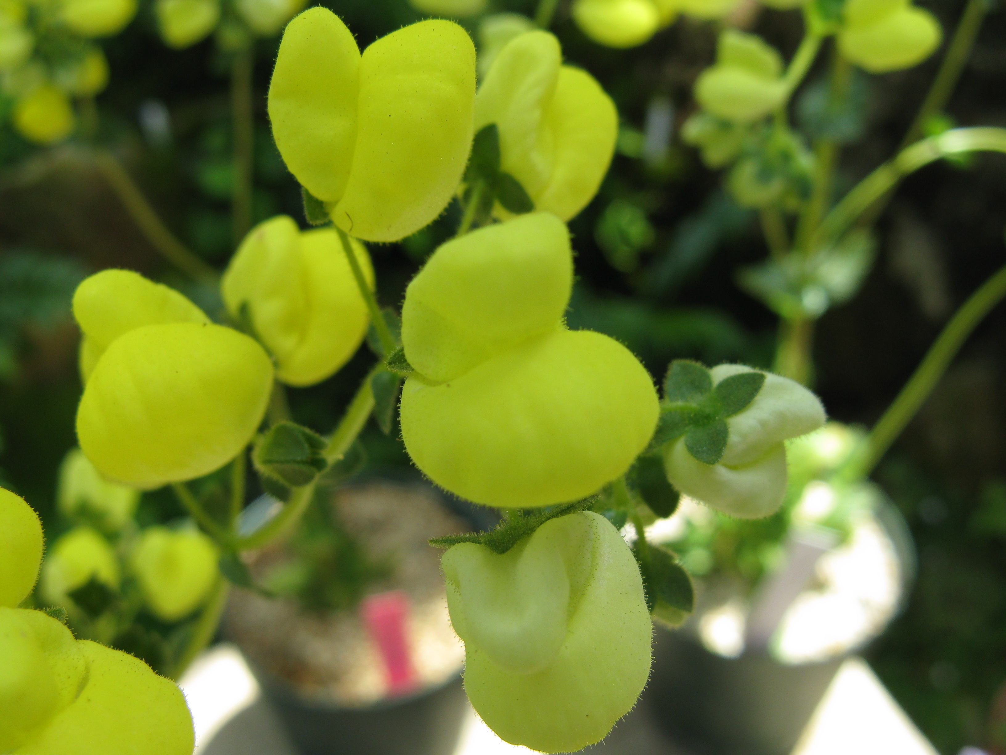 Calceolaria glandulosa Place:Osaka Prefectural Flower Garden,Osaka,Japan